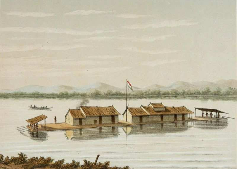 Litho. Litho naar een oorspronkelijke aquarel van Rappard. Een vlot bebouwd met huizen op de rivier de Barito